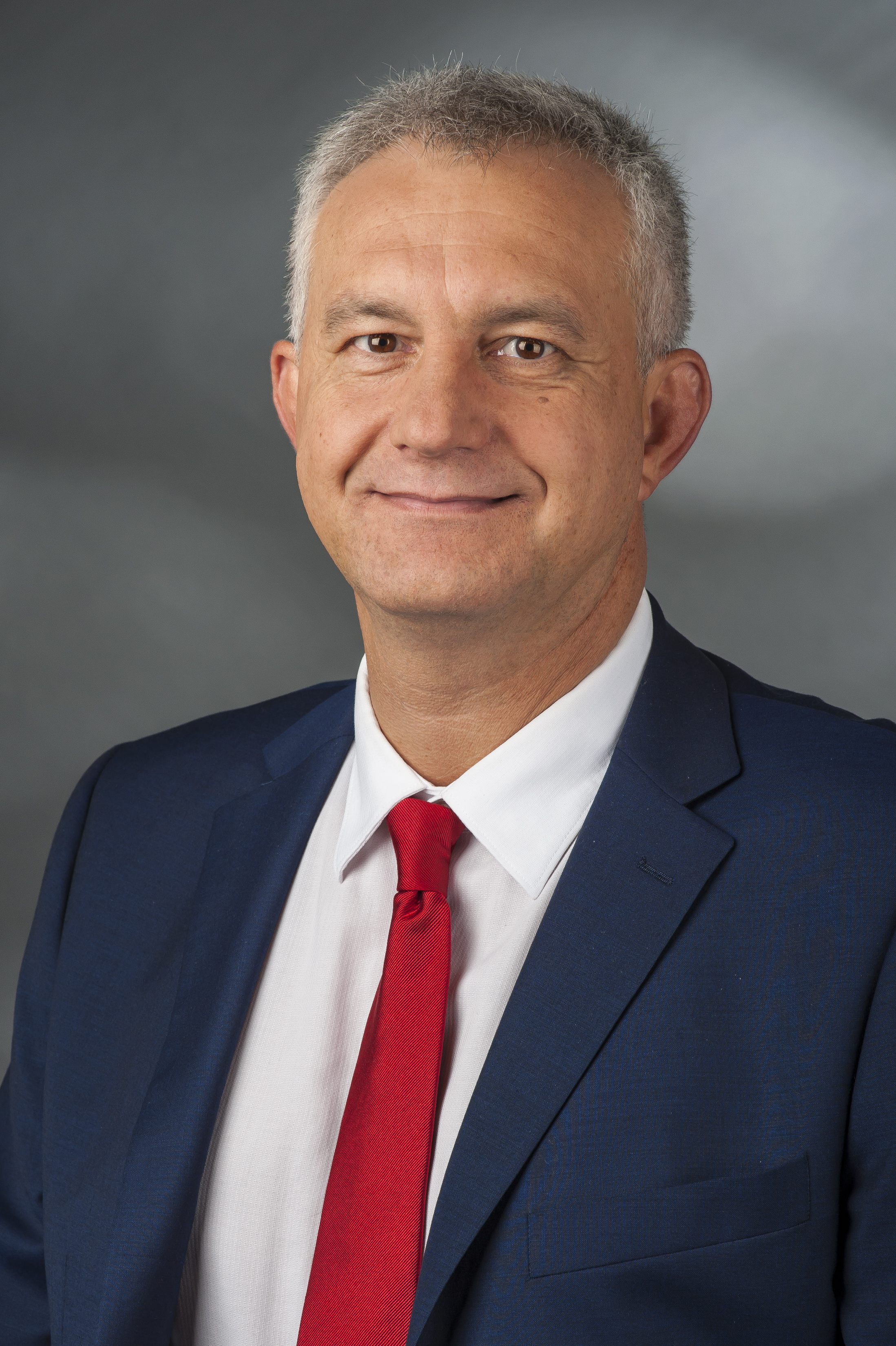 Steffen-Claudio Lemme (* 1. April 1965 in Erfurt) ist ein deutscher Politiker (SPD) und Gewerkschafter. Seit Oktober 2009 ist er Mitglied des Deutschen Bundestages.